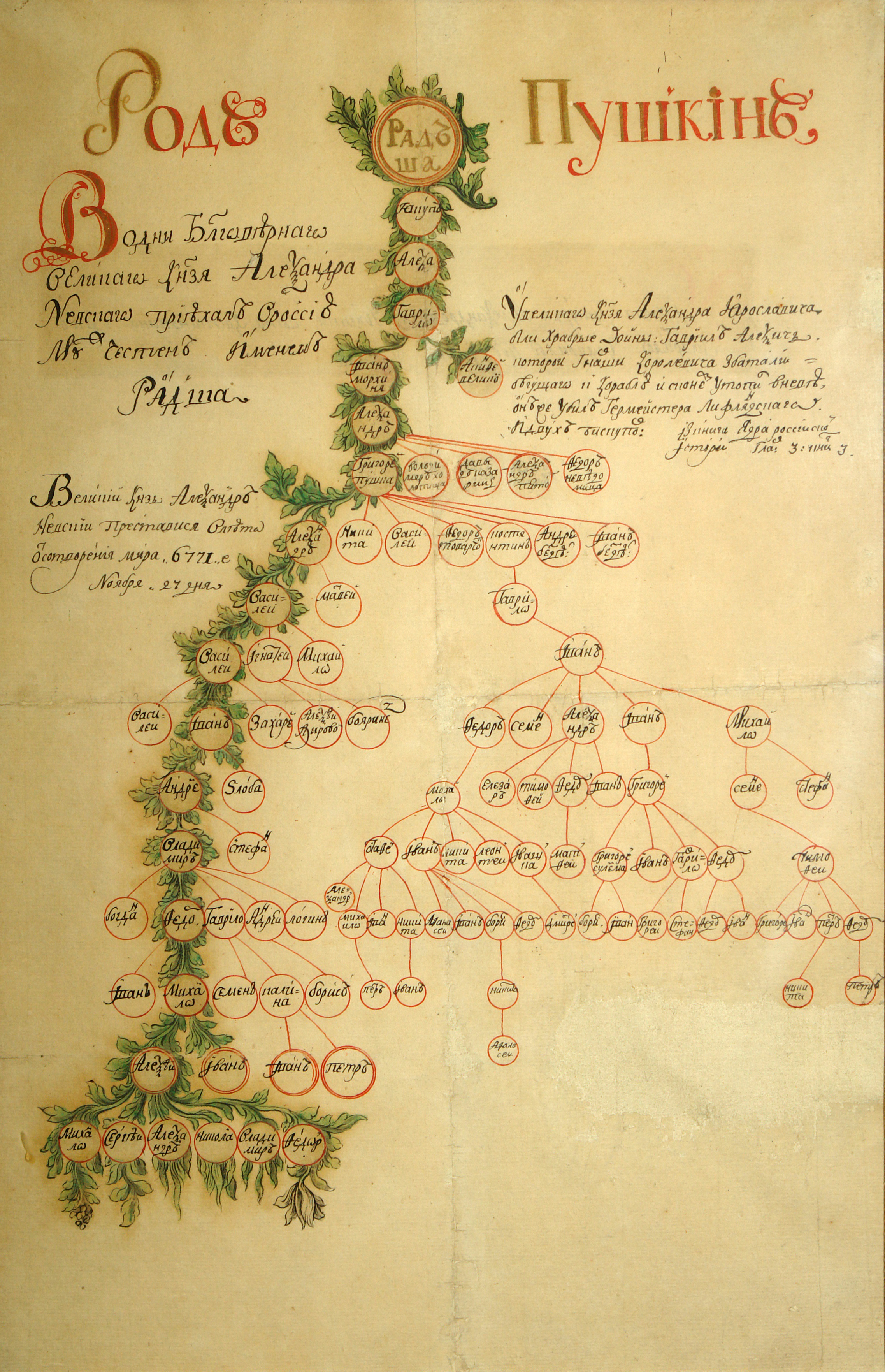 Родовое дерево Пушкиных (акварель)